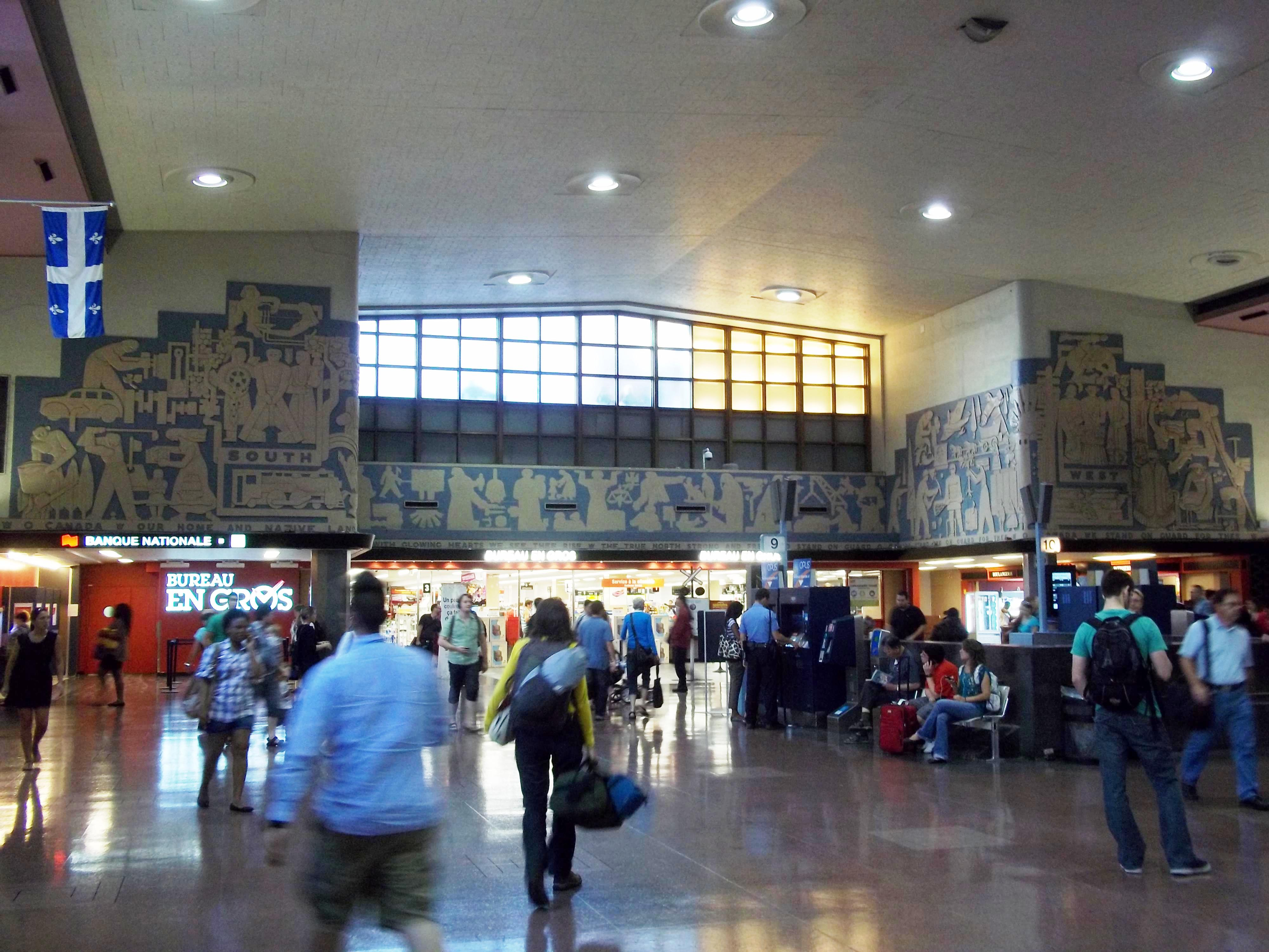 Gare centrale de Montréal